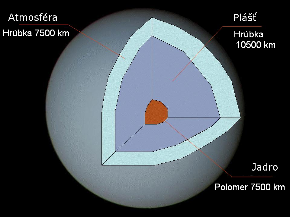 Vnútorná stavba Uránu